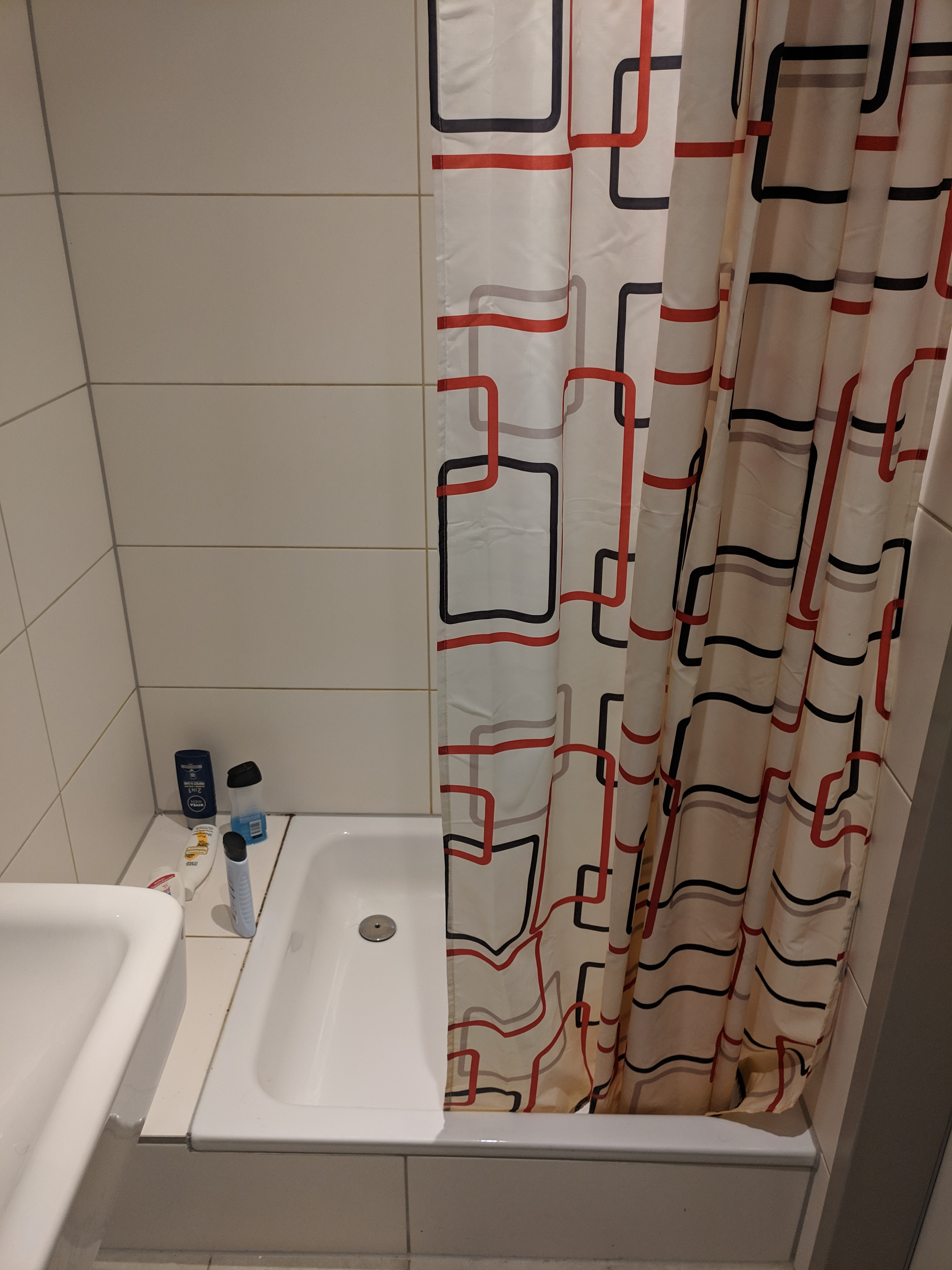 粵語: 一隻典型嘅阿卡力企缸同埋一幅浴簾